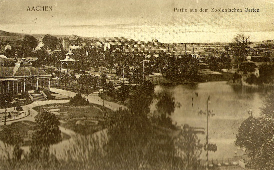 Scan einer alten Postkarte